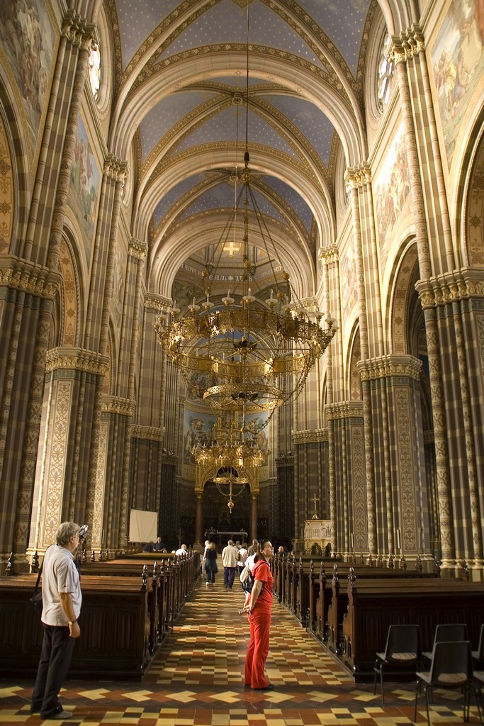 Đakovačka katedrala